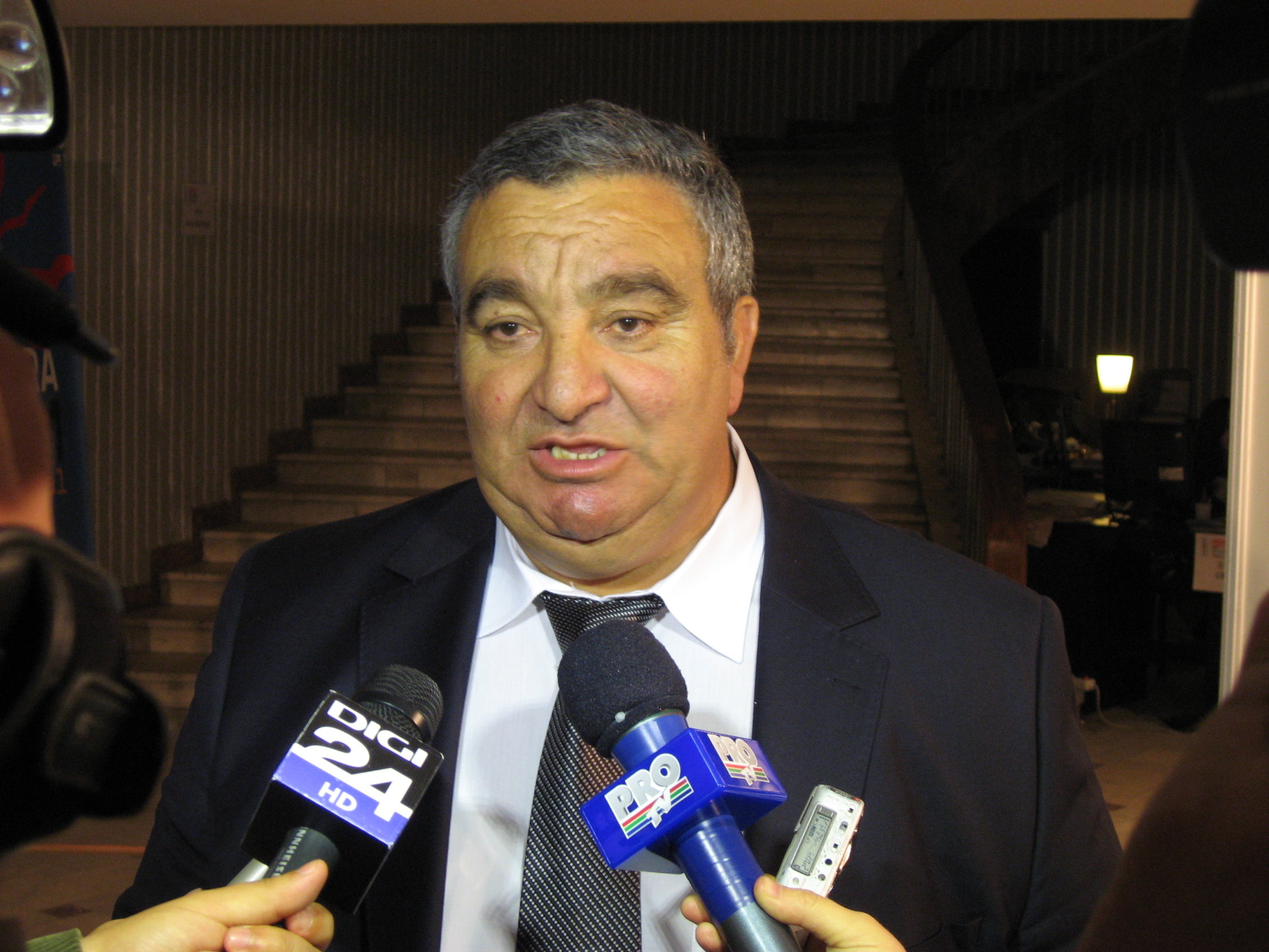 Florin Cioabă, Vertreter der Volksgruppe der Roma in Rumänien und selbsternannter „König der Roma“, bei der Präsentation seines Films „Adevarul despre Holocaust“ am Astra-Filmfestival 2012 in Hermannstadt